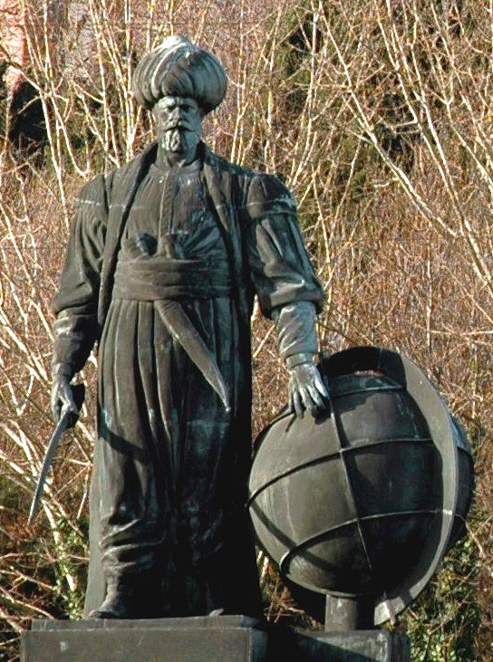 Istanbul - Estàtua de Turgut Reis sota el Palau de Topkapi